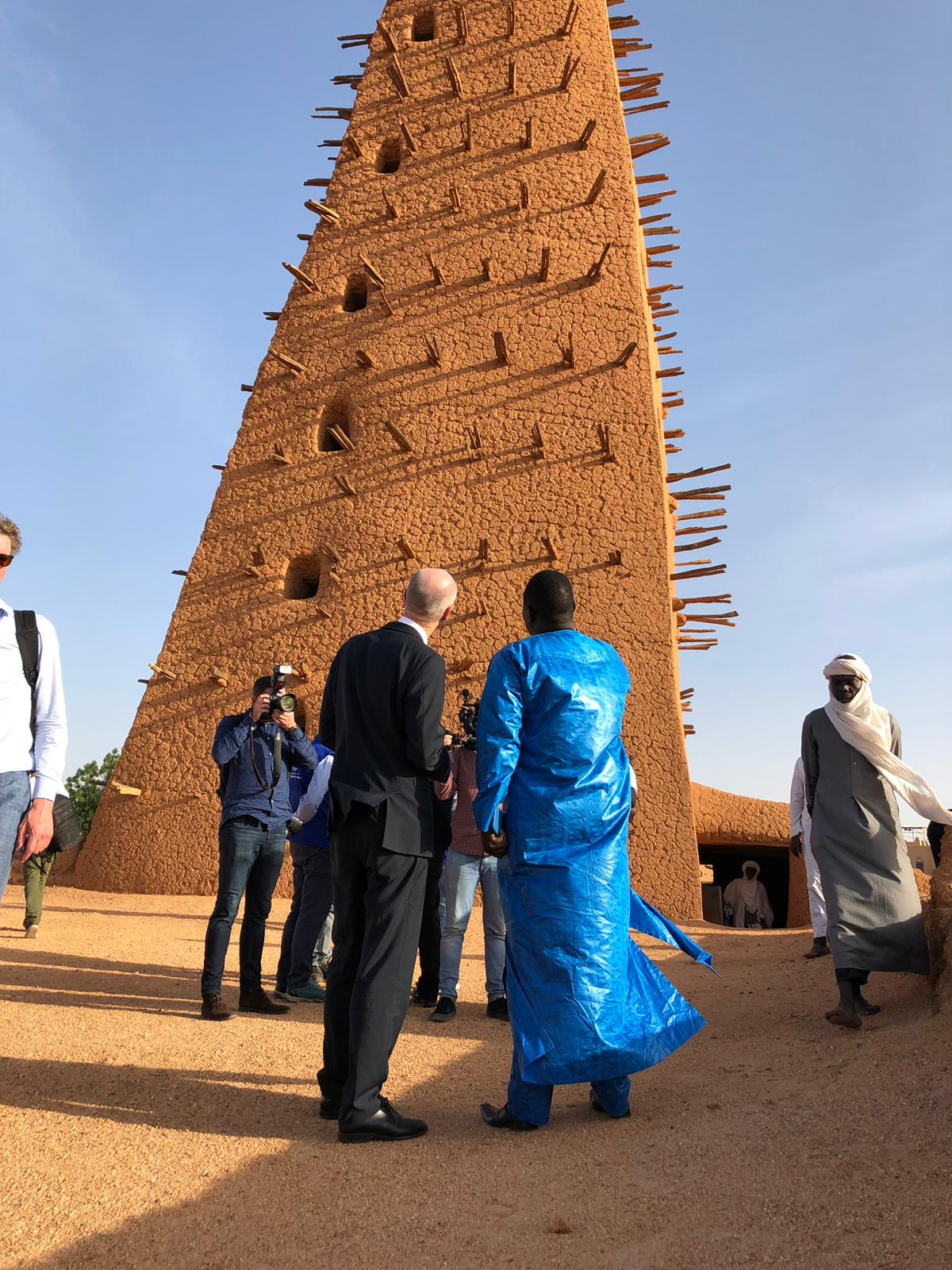 Minister Blok bracht van 30 oktober tot en met 1 november een bezoek aan achtereenvolgens Nigeria, Niger en Tunesië. Deze landen zijn op veel gebieden belangrijke partners voor Nederland. Minister Blok in gesprek met lokale autoriteiten in Agadez, Niger.